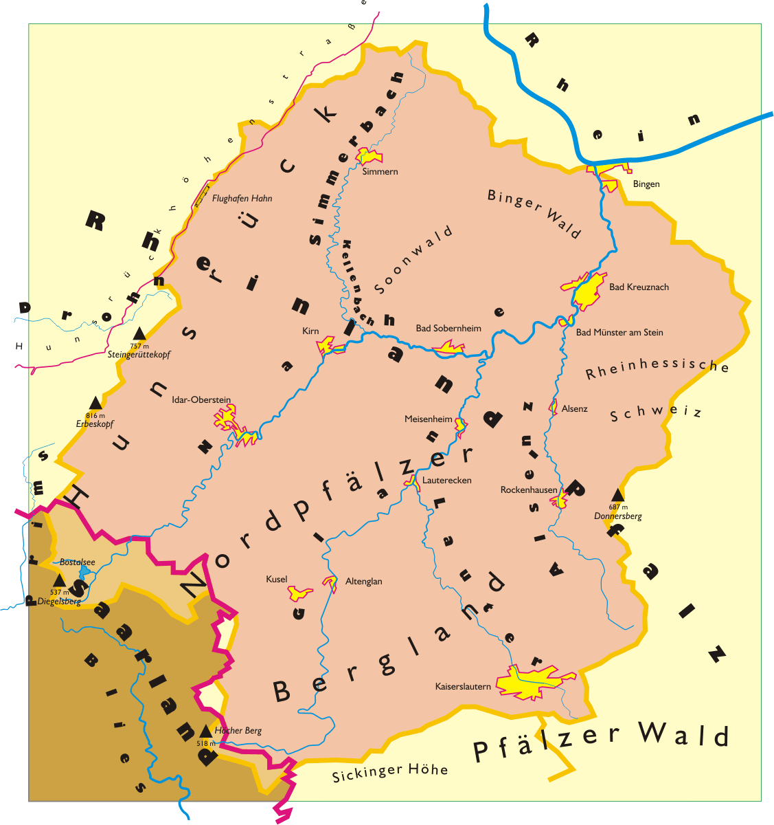 Die Nahe mit ihren wichtigsten Zuflüssen und der Wasserscheide